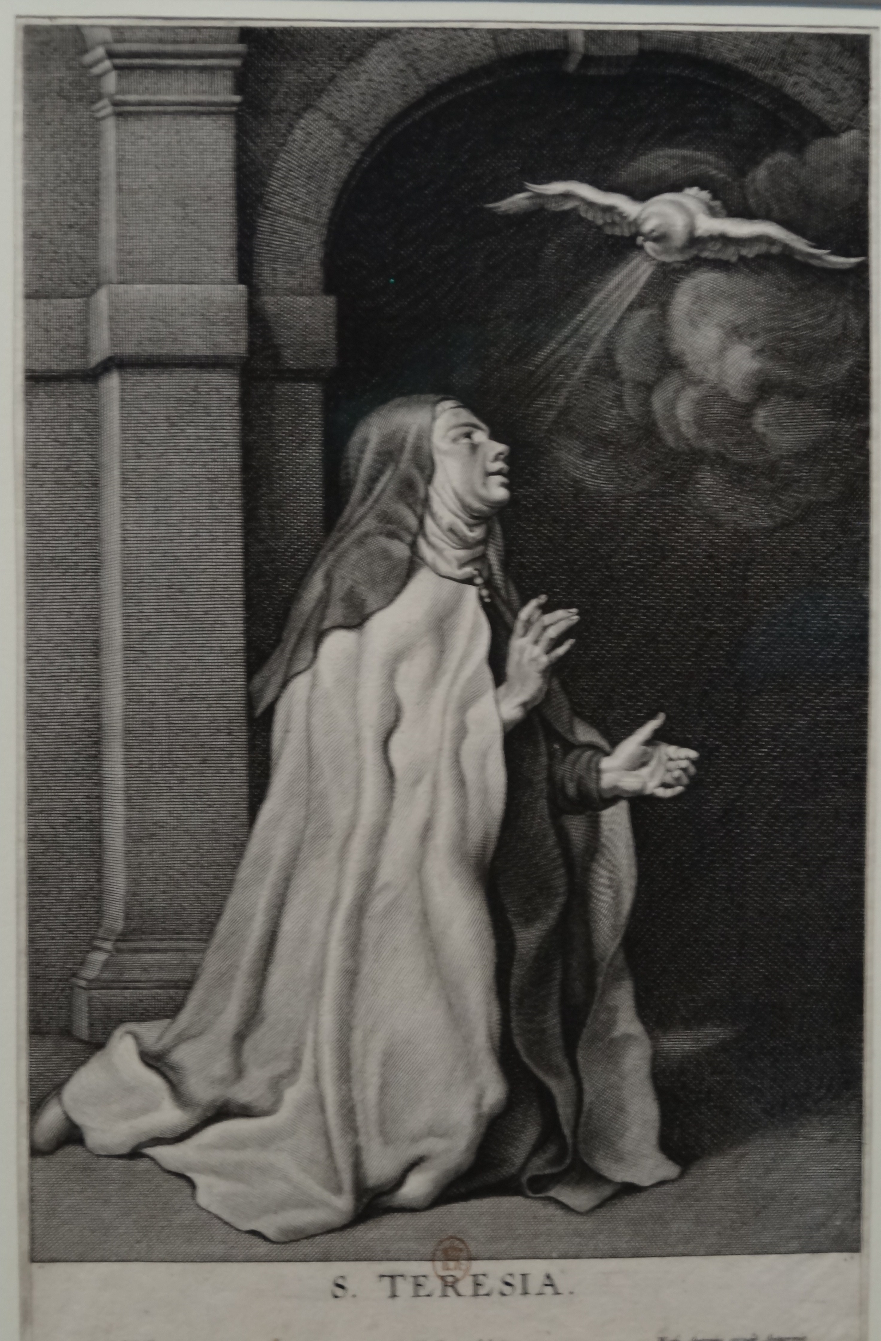 L'Europe de Rubens, Louvre-Lens, 22 May 2013-23 September 2013